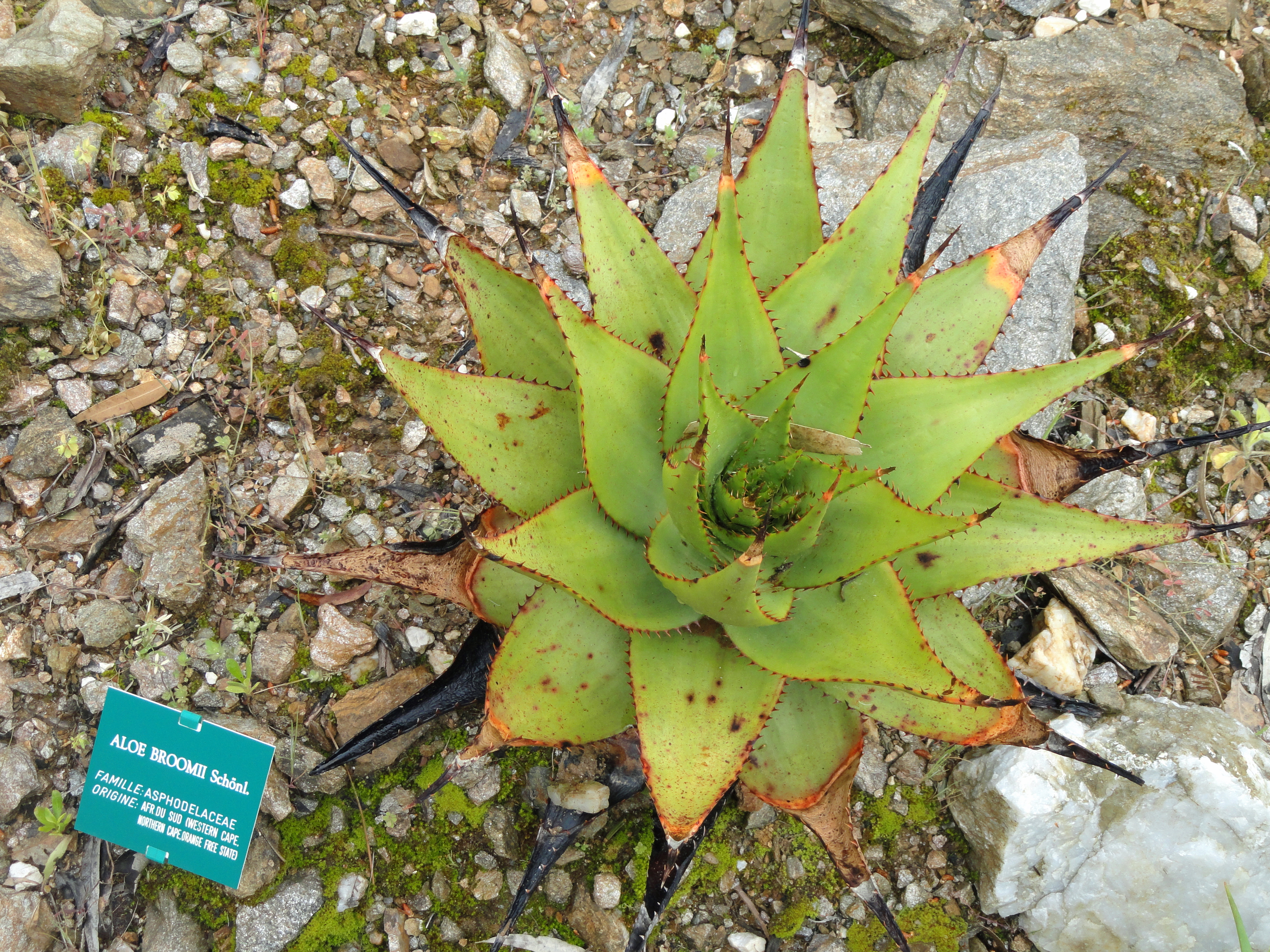 Aloe broomii specimen in the Jardin d'oiseaux tropicaux, La Londe-les-Maures, France.